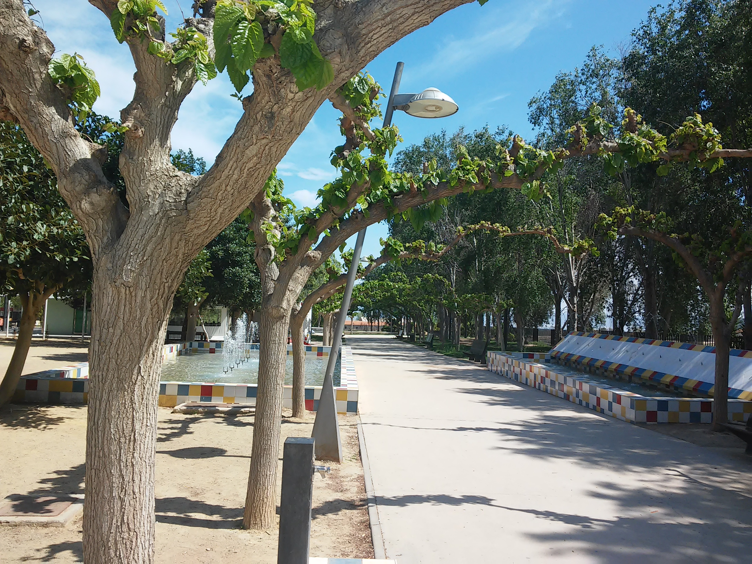 Panorámica del Parque dedicado al grafólogo Augusto Vels en su ciudad natal. (01)